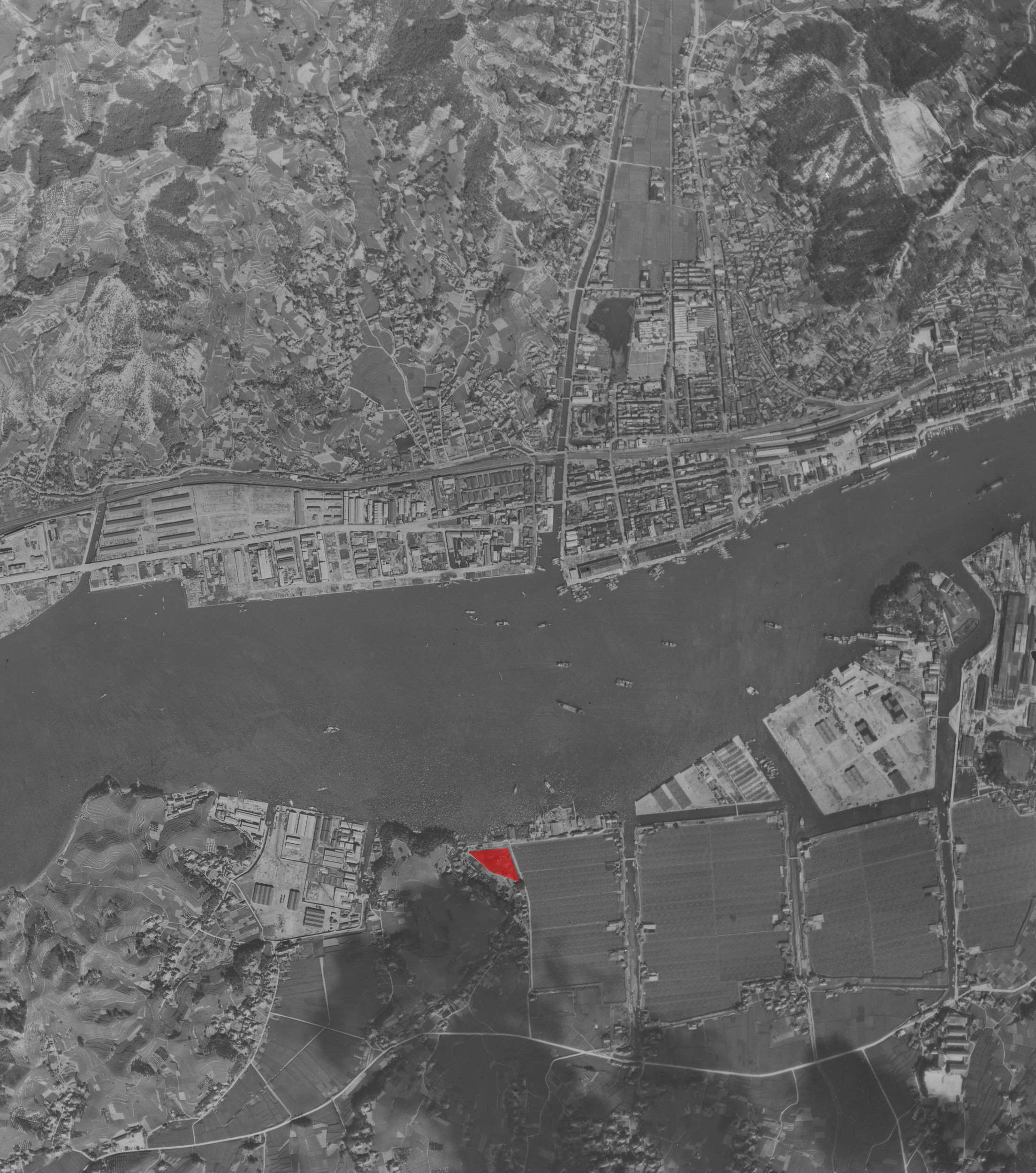 1947年広島県尾道市向島の空中写真に海物園跡を示したもの